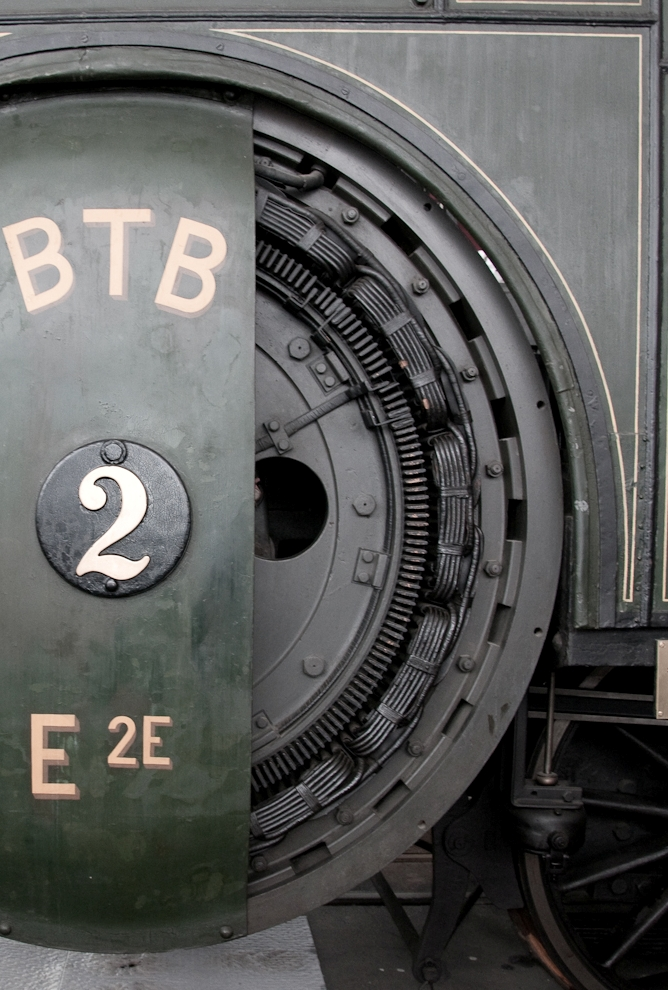 Lokomotive 2, Baureihe E2E, der Burgdorf-Thun-Bahn im Verkehrsmuseum Luzern